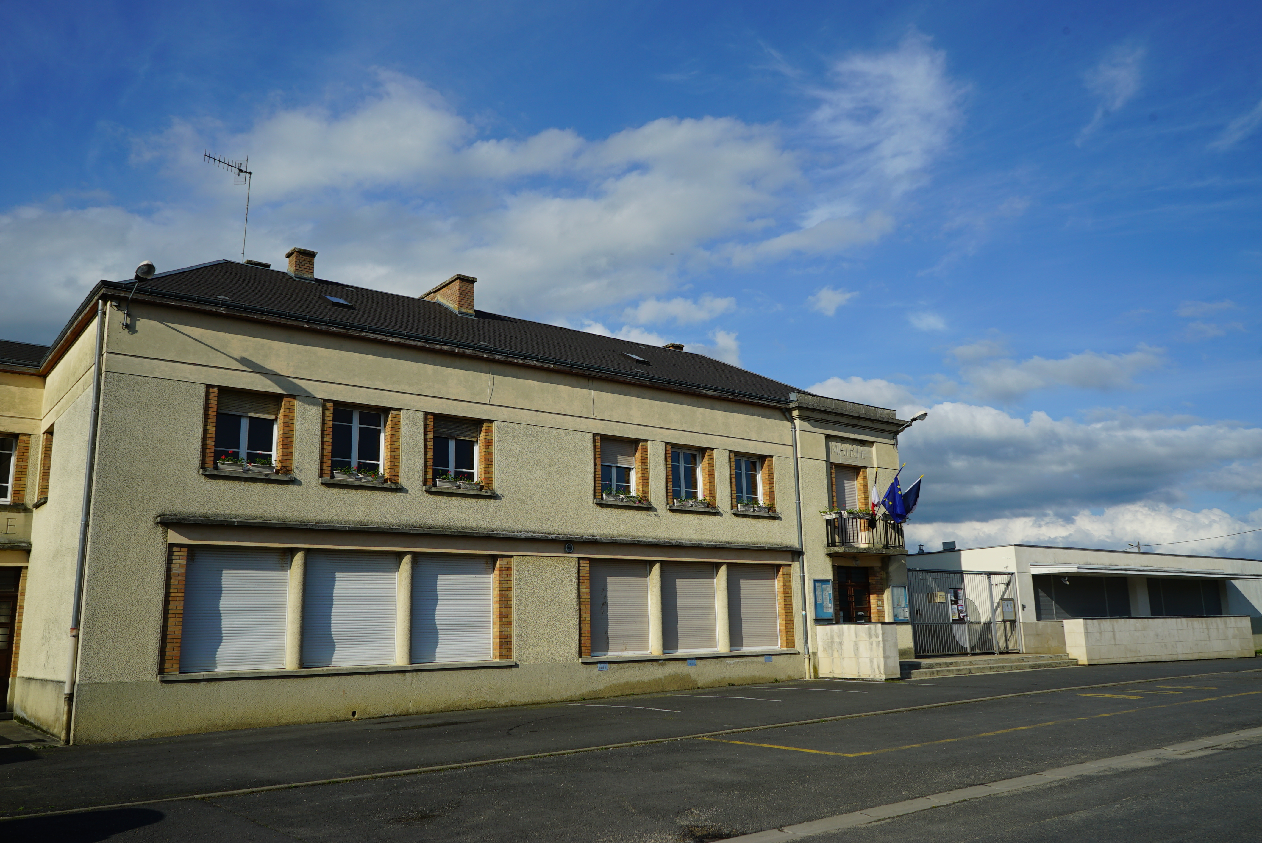 du village.